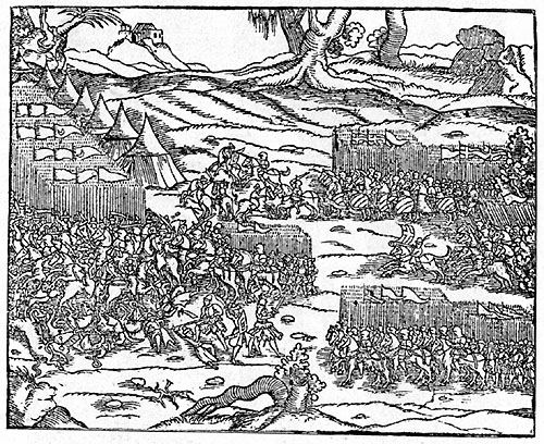 A képen a grünwaldi csata látható egy 15. század végi fametszeten